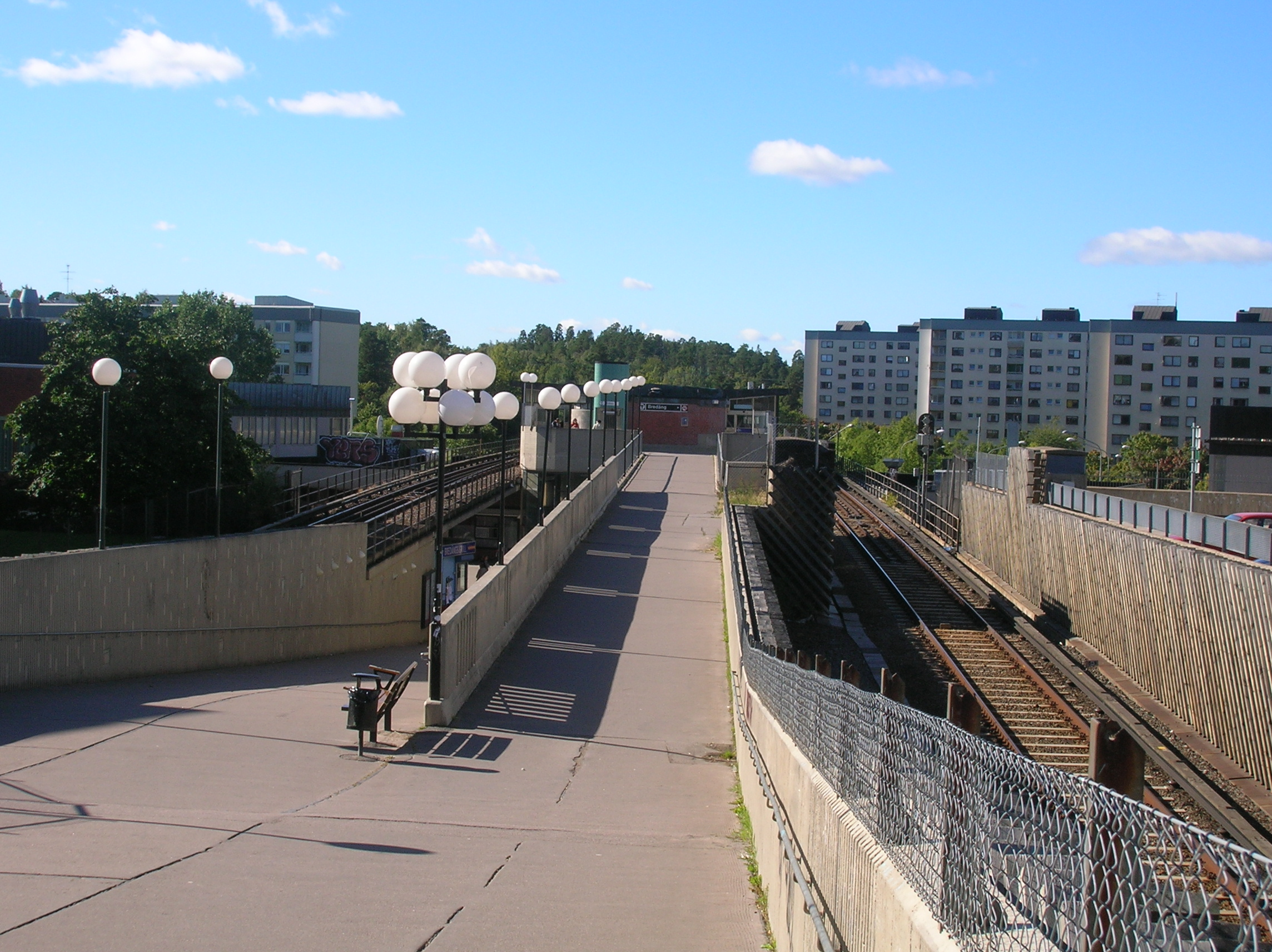 Bredängs tunnelbanestation sett från Gröna husets stig. Bredäng, Stockholm